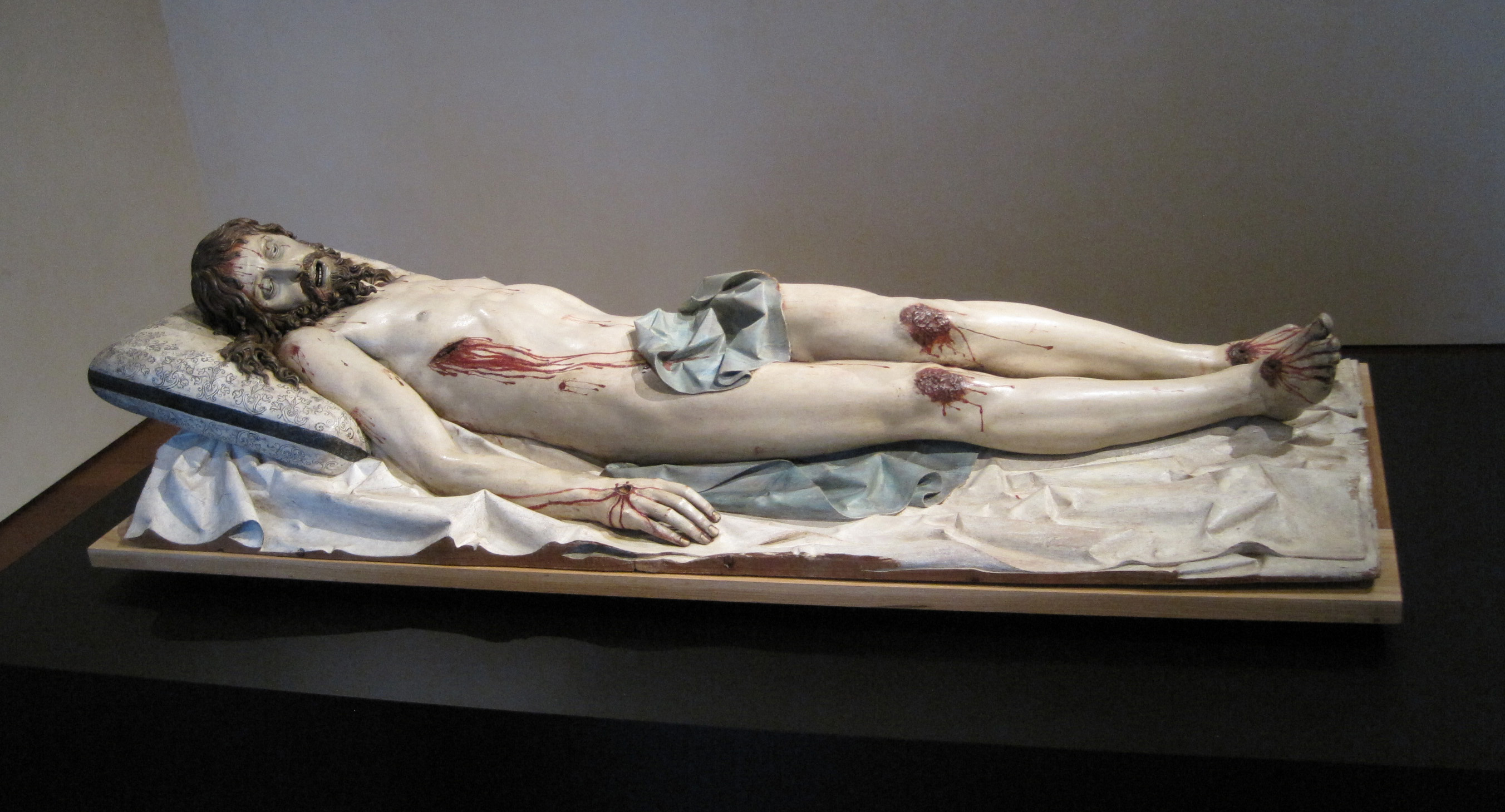 Cristo yacente (1627), obra de Gregorio Fernández. Procede de la Iglesia de la Casa Profesa de la Compañía de Jesús en Madrid. Museo Nacional Colegio de San Gregorio (Valladolid, España).